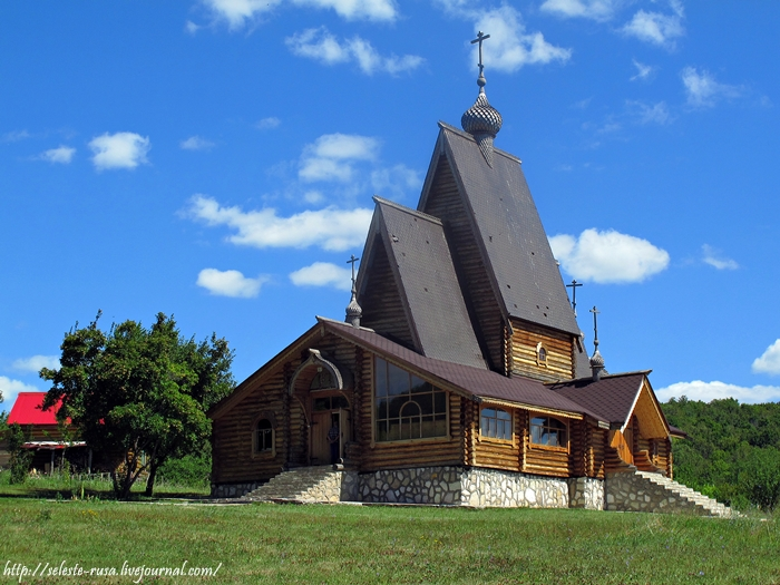 Храм. Заволжский монастырь в честь Честного и Животворящего Креста Господня